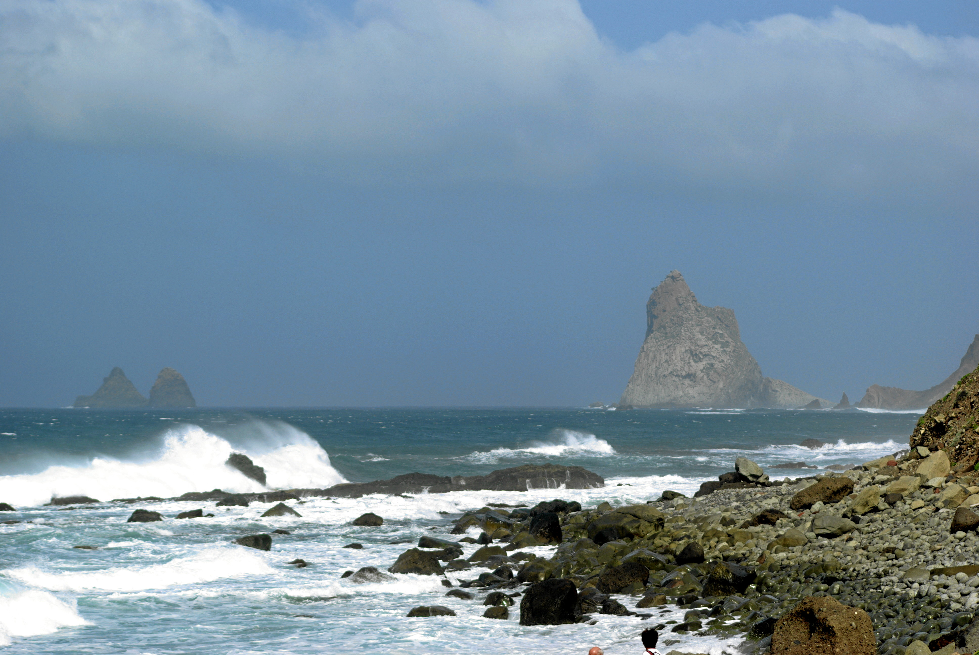 Teneriffa, Roques de Anaga